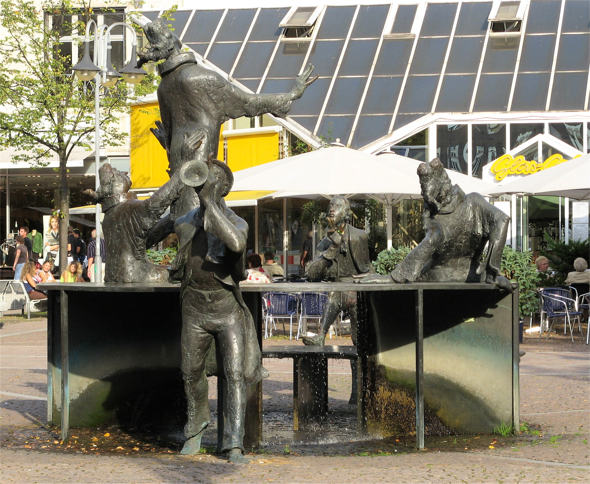 Bochum, Jobsiade-Brunnen (1986-1987) auf dem Husemannplatz